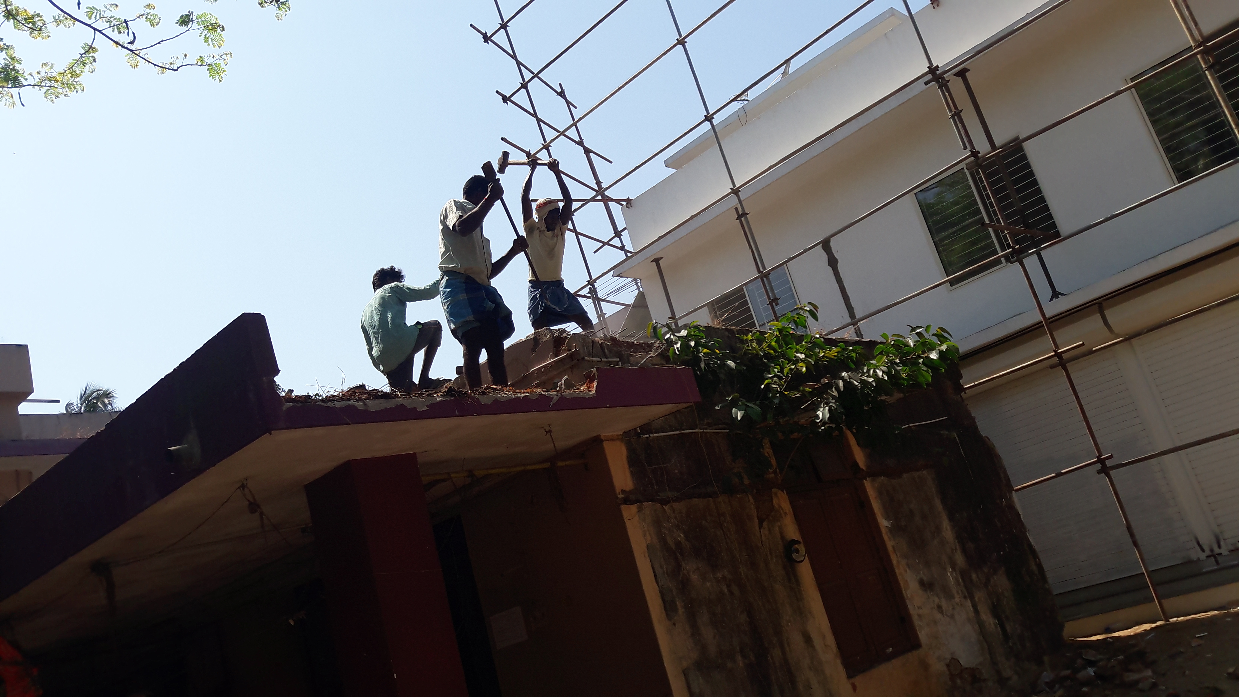 പൊളിക്കുന്ന കെട്ടിടത്തിന്‍ മേലെ ഒരു കൊയലി മരം / ചേല മരം.Indian bat tree / Indian bat fig ശാസ്ത്രീയ നാമം Ficus amplissima.